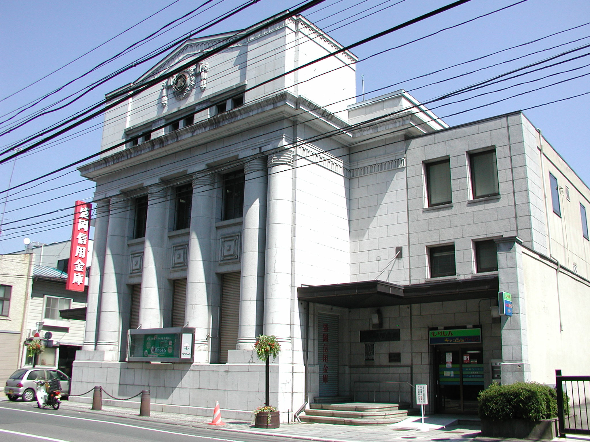 盛岡信用金庫 本店（店番：001）